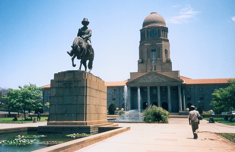 Auteur de la photographie : Georgio Année : 1998 Lieu : Pretoria, Afrique du Sud